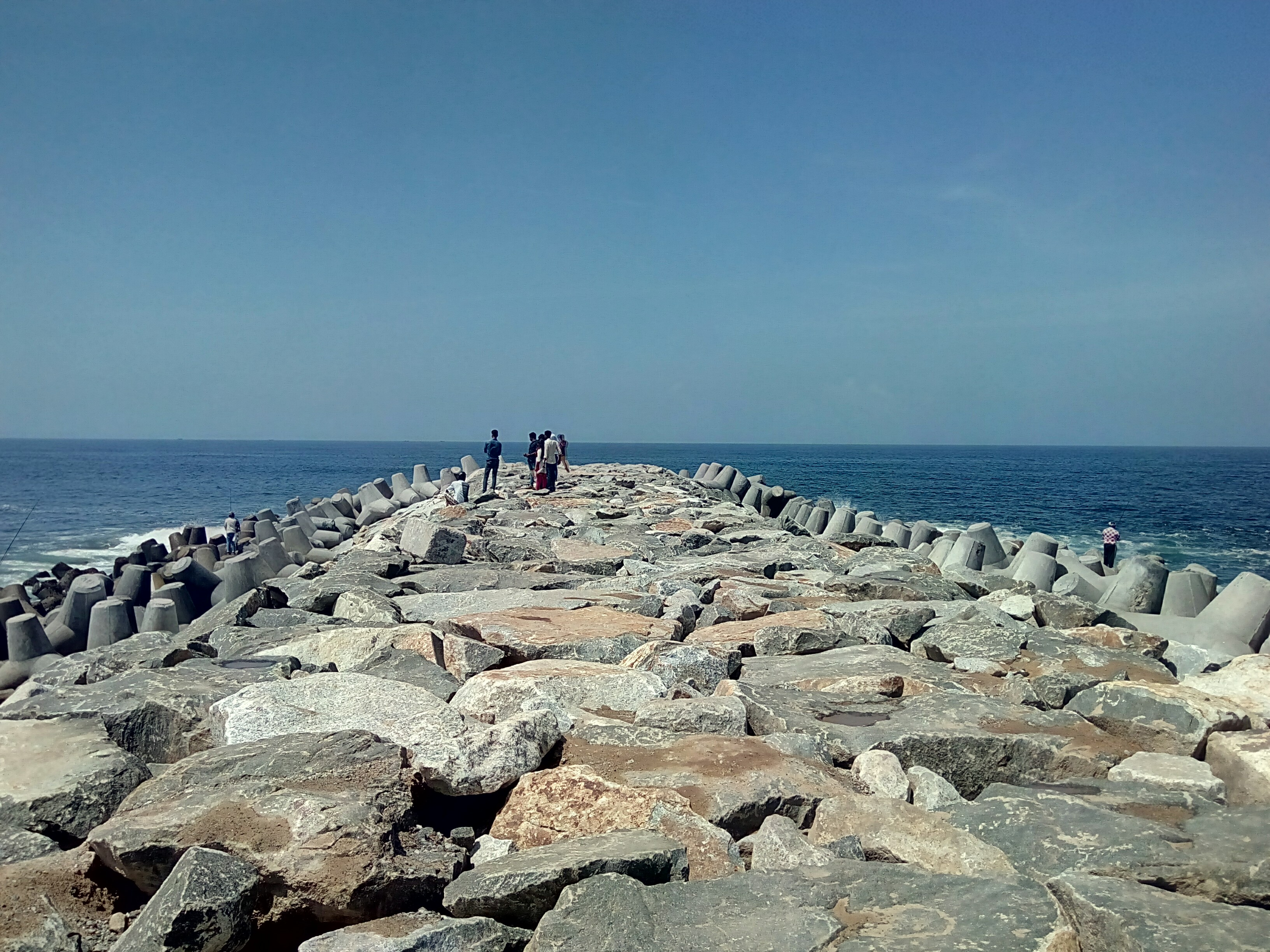 Perumathura Beach